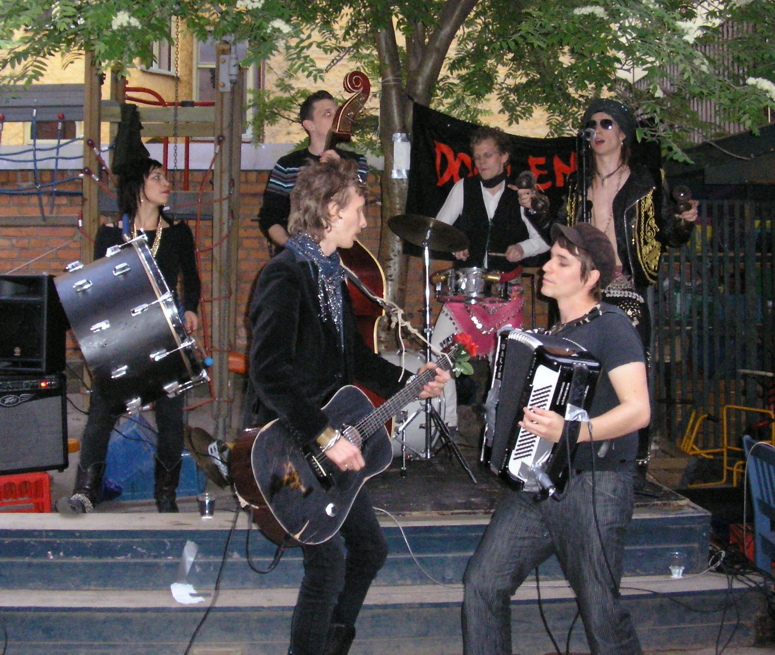 Dorlene Love playing at Klubb Sockerdricka, Kafé 44